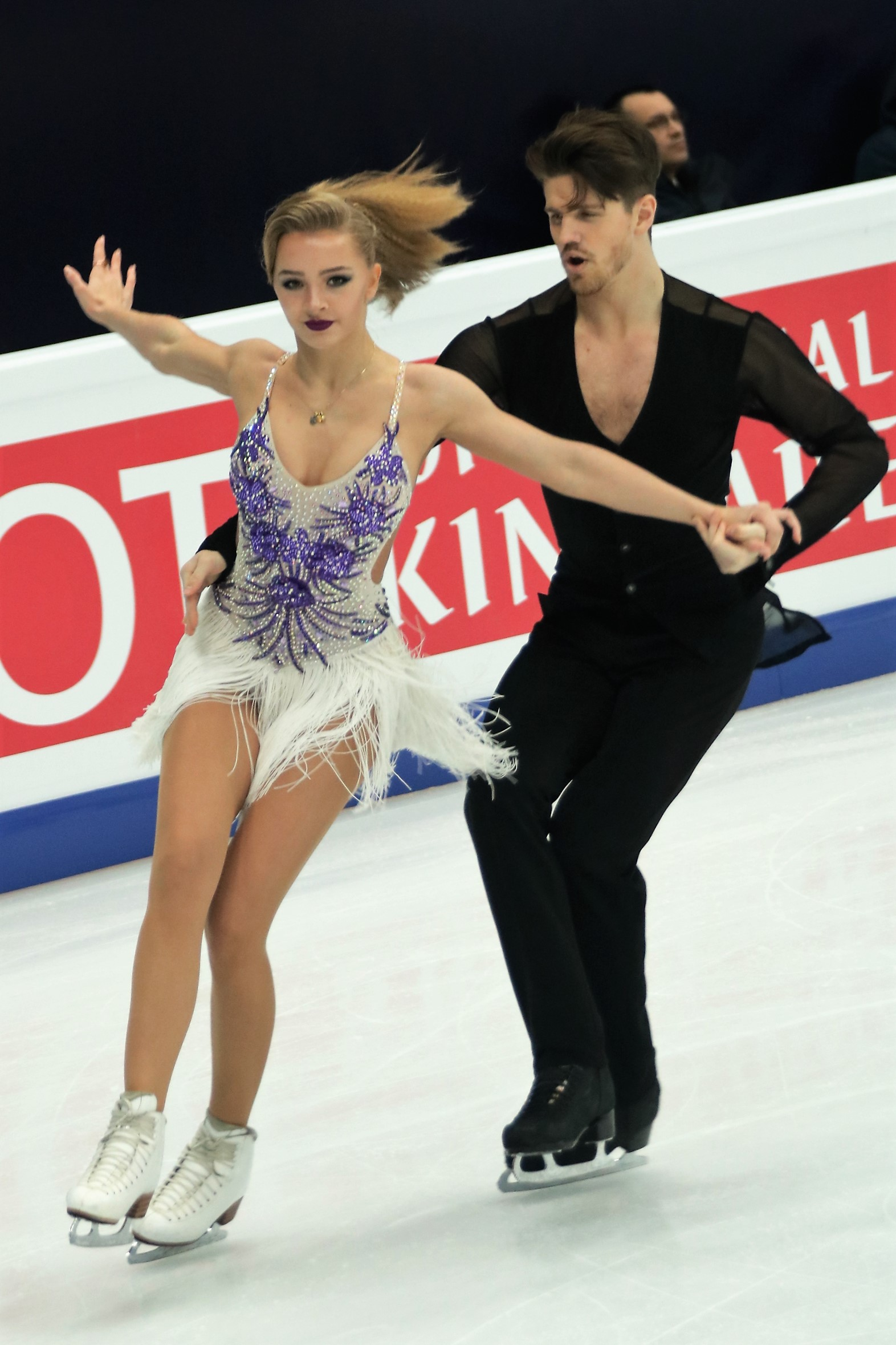 Александра Степанова / Иван Букин (Россия) на Чемпионате Европы по фигурному катанию 2018.